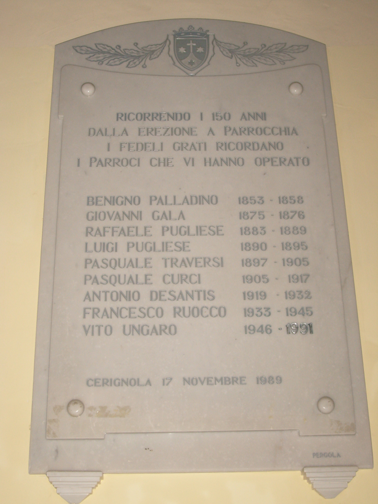 Lapide commemorativa dedicata ai parroci della Chiesa del Carmine di Cerignola (FG).